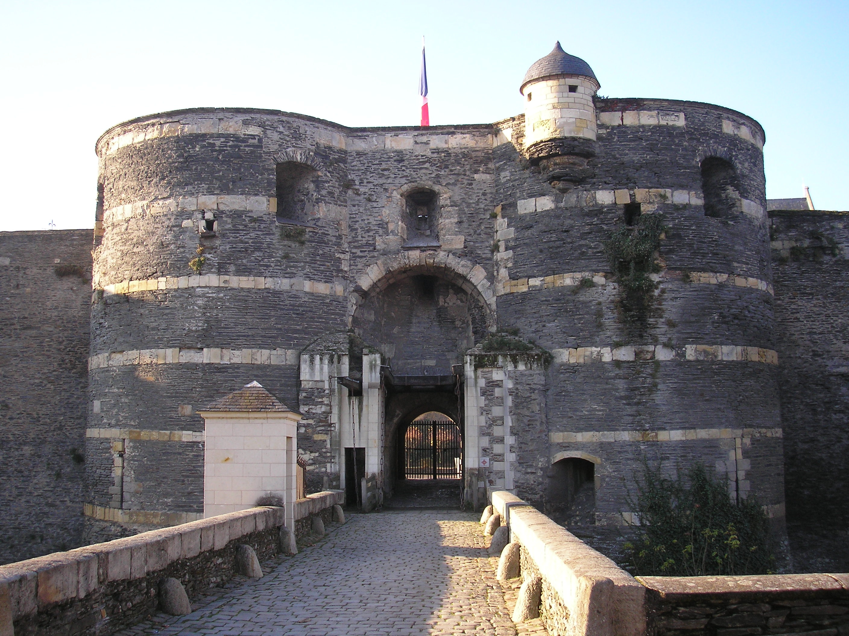 Angers (Pays-de-Loire, France). Le château : la Porte de la Ville.